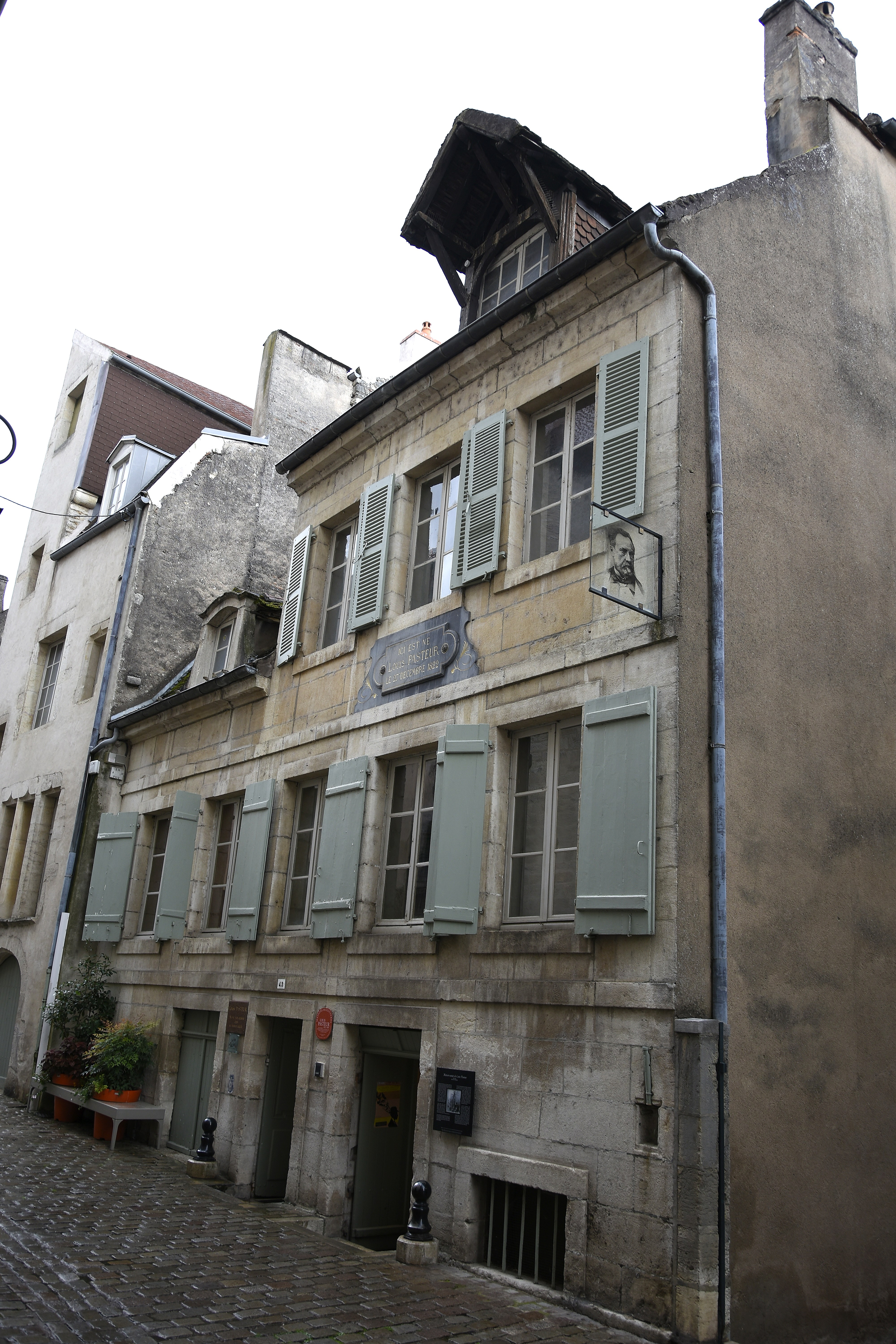 Dole - Geboortehuis Louis Pasteur 15-09-2017 16-49-44